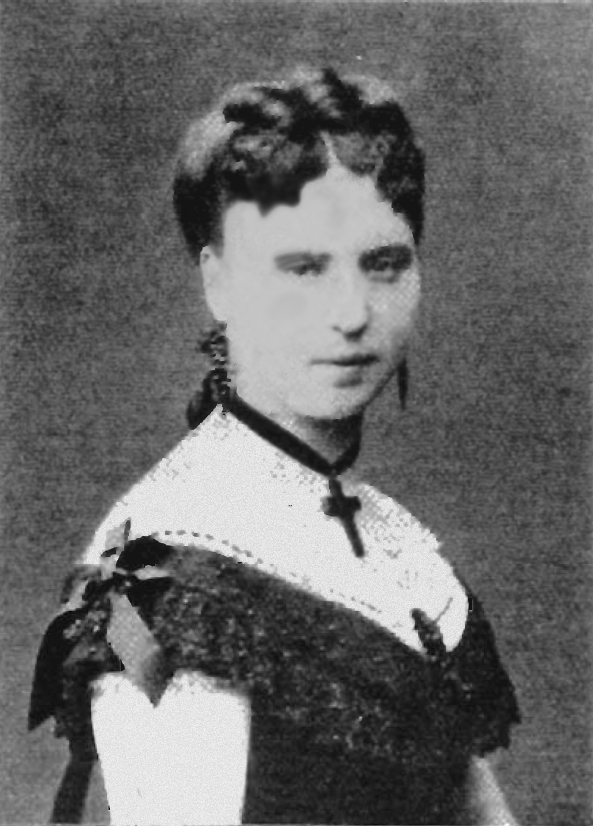 Actrice belge, professeure de déclamation au Conservatoire royal de Bruxelles - XIX siècle